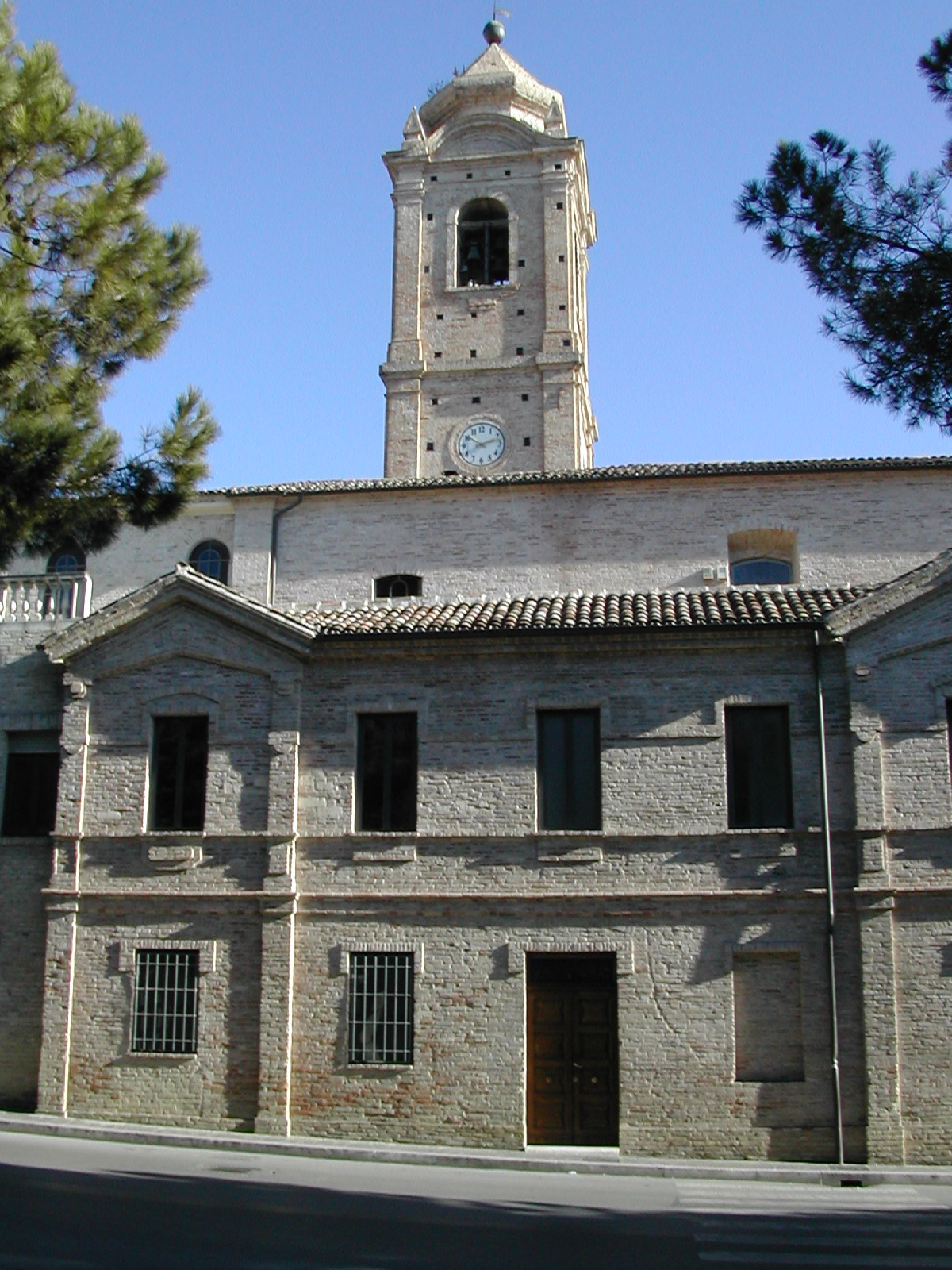 Campanile Basilica dei sette dolori pescara vista laterale Foto dell'autore ingresso Basilica dei sette dolori a Pescara - Abruzzo - Italia